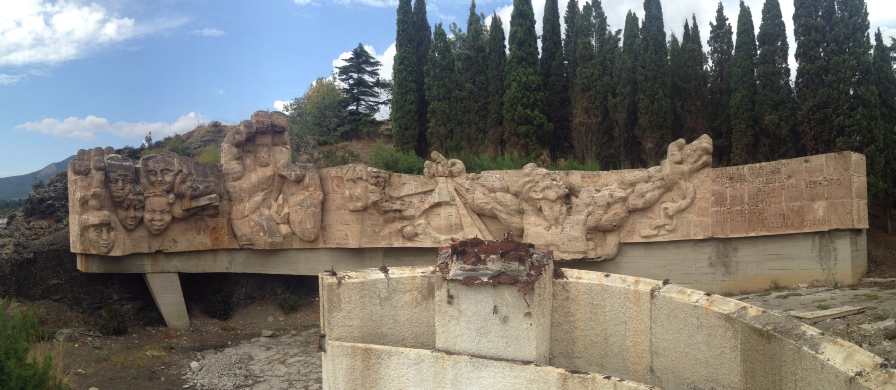 Монумент «Дружба детей Мира». Дата сооружения: 1967 г.: МДЦ «Артек», лагерь «Морской», у столовой, Гурзуф, Ялта, Крым. Скульптор - Эрнст Неизвестный This object is located on the Crimean Peninsula and recognized as cultural heritage by Russia under the monument ID: 8231815000. The legal status of the Crimean region is currently disputed.